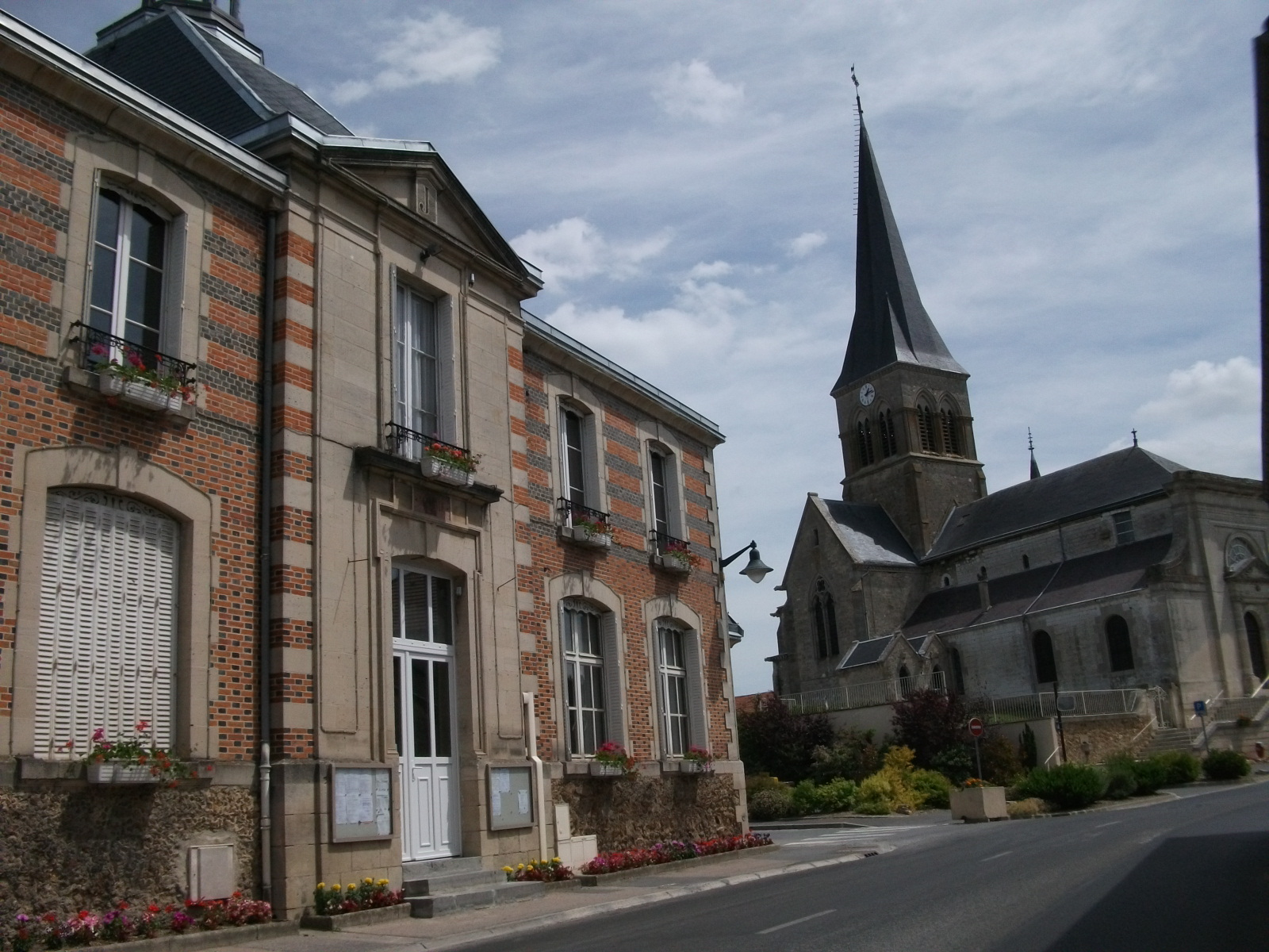 vue de la Mairie et de l'église de Juvigny.